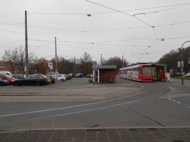 Straßenbahn-Wendeschleife Westfriedhof in Nürnberg